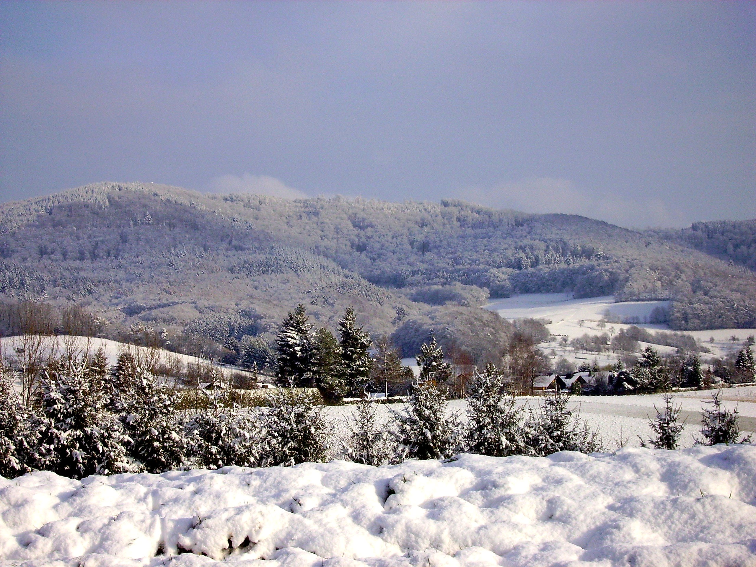 Tromm im Winter